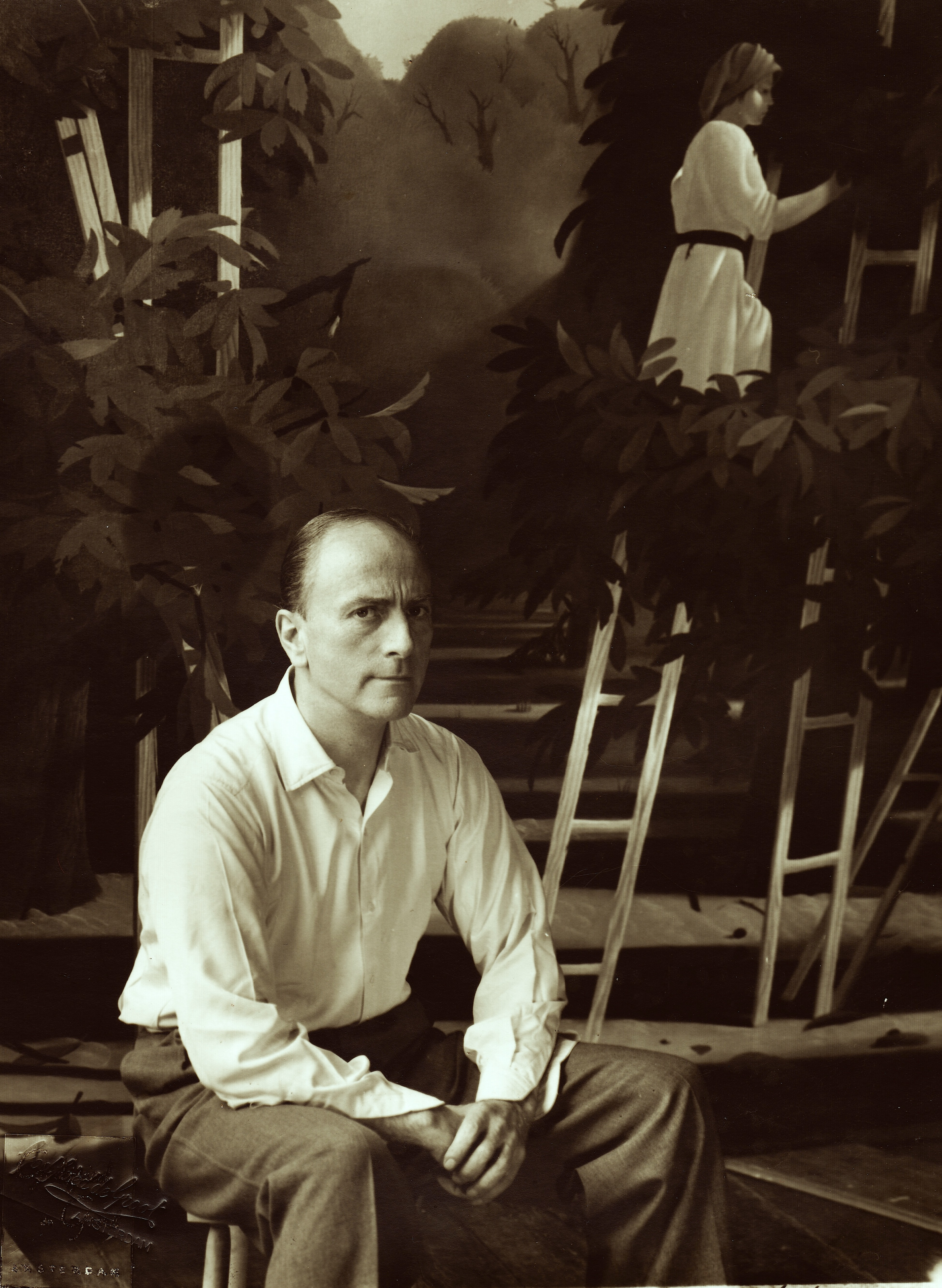 De schilder Pyke Koch in zijn atelier. Achter hem zijn schilderij De Oogst uit 1953, gemaakt in opdracht van Taecke Botke voor de Witte Salon in diens huis te Maastricht. NB: op de originele foto staat 1955, wat zou kunnen betekenen dat de foto bij Botke thuis gemaakt is.